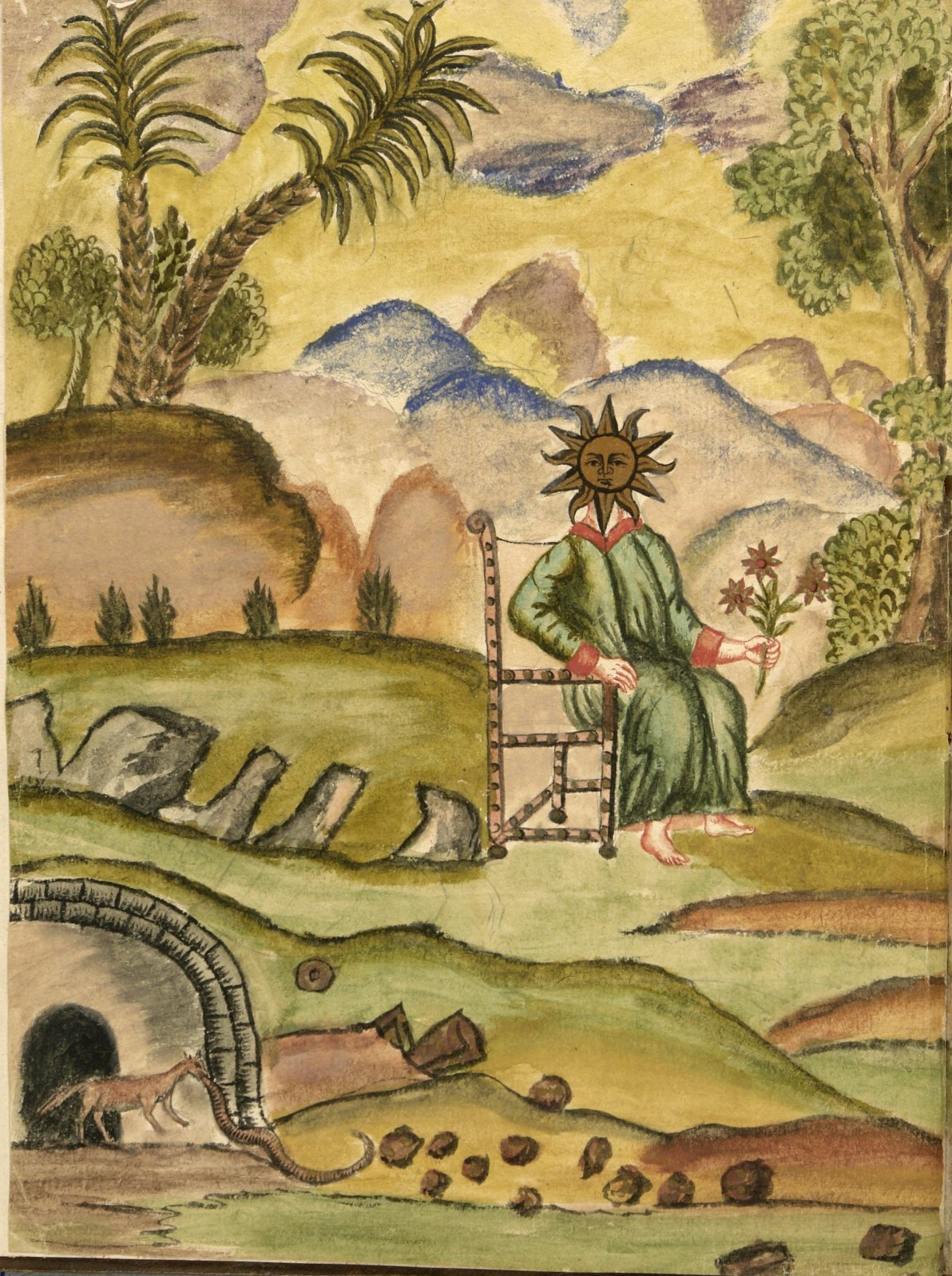 Immagine del manoscritto Zoroaster Clavis Artis, Ms-2-27, Biblioteca Civica Hortis, Trieste, vol. 3, pag. 2